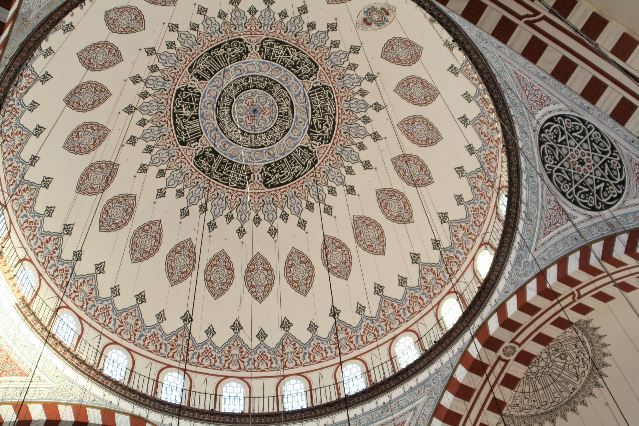 Sehzade-dzsámi, Isztambul, kupoladíszítés